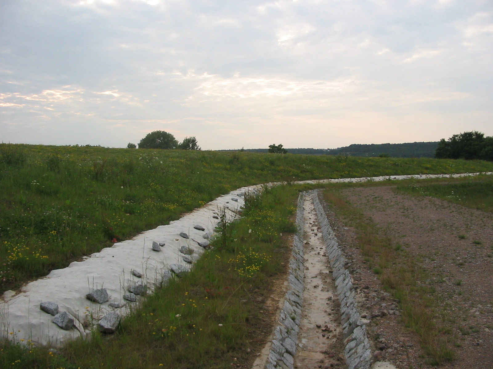 Renaturierte Mülldeponie auf dem Proschhübel in Dresden